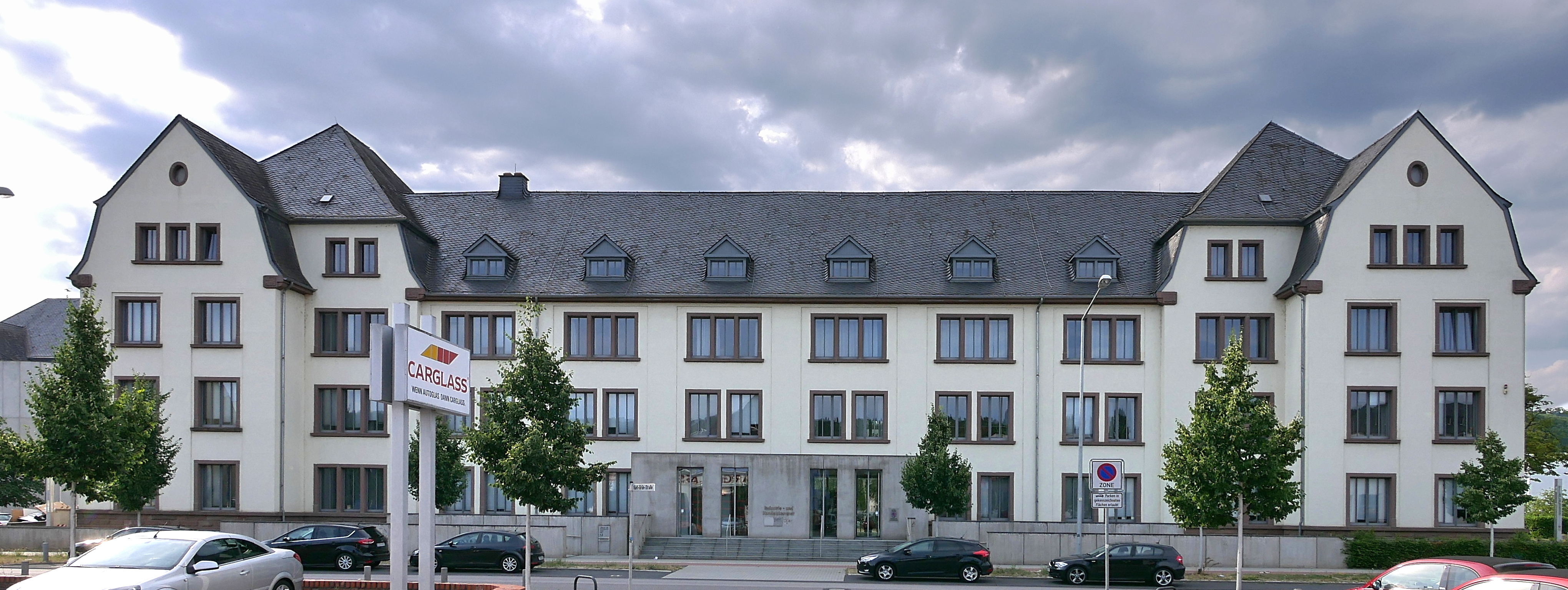 Trier :ehemalige Jaegerkaserne HerzogenbuscherStrasse 10 jetzt Sitz der IHK Trier